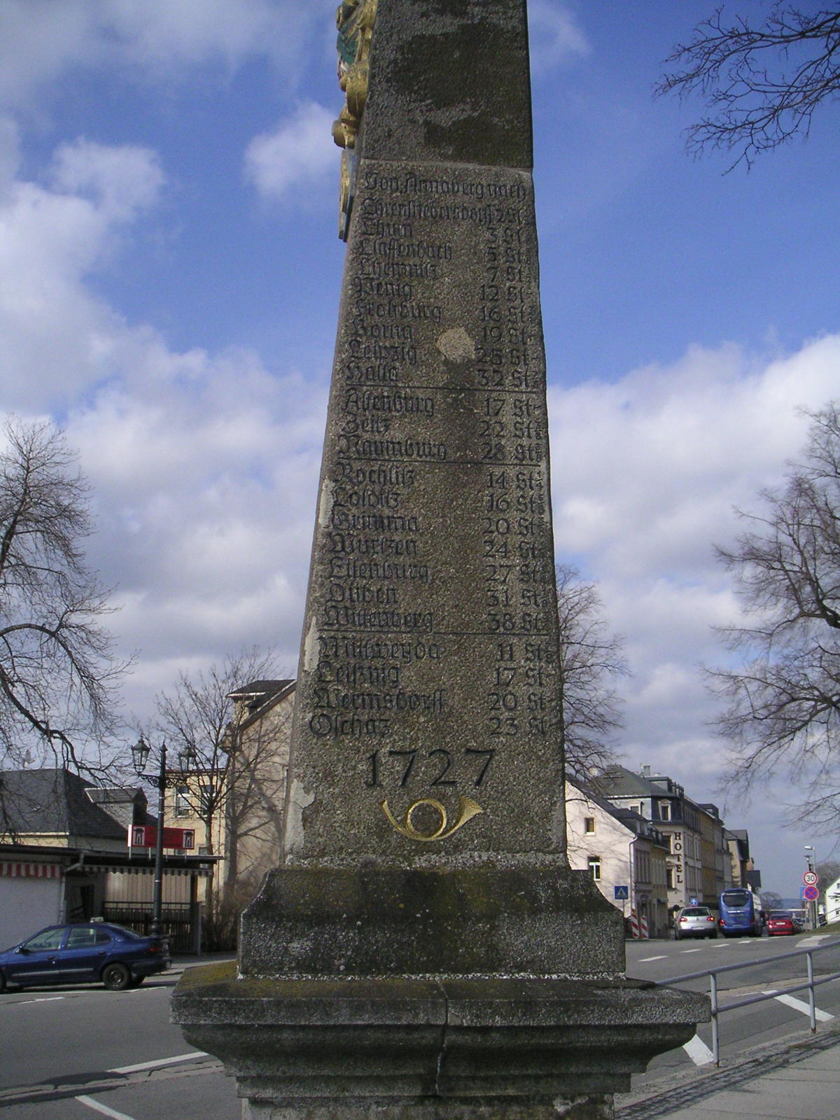 Detail der kursächsische Postmeilensäule von 1727 in Annaberg, beim ehemaligen Wolkensteiner Tor